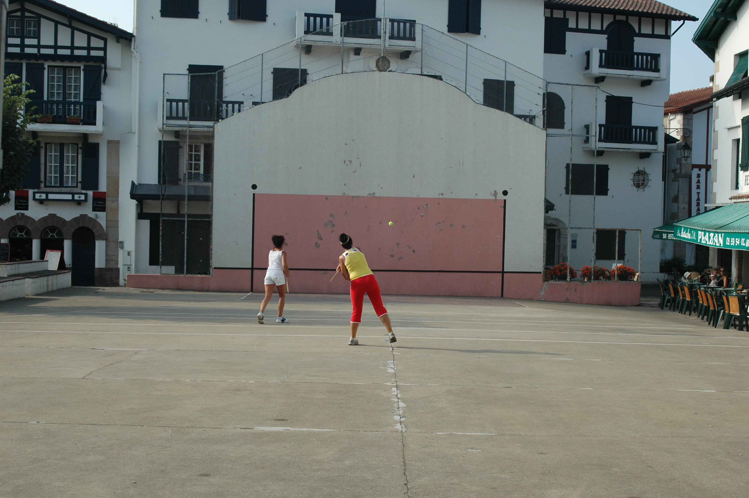 Ascain, partie de pala féminine. Photo prise le 23/07/06 par Harrieta171